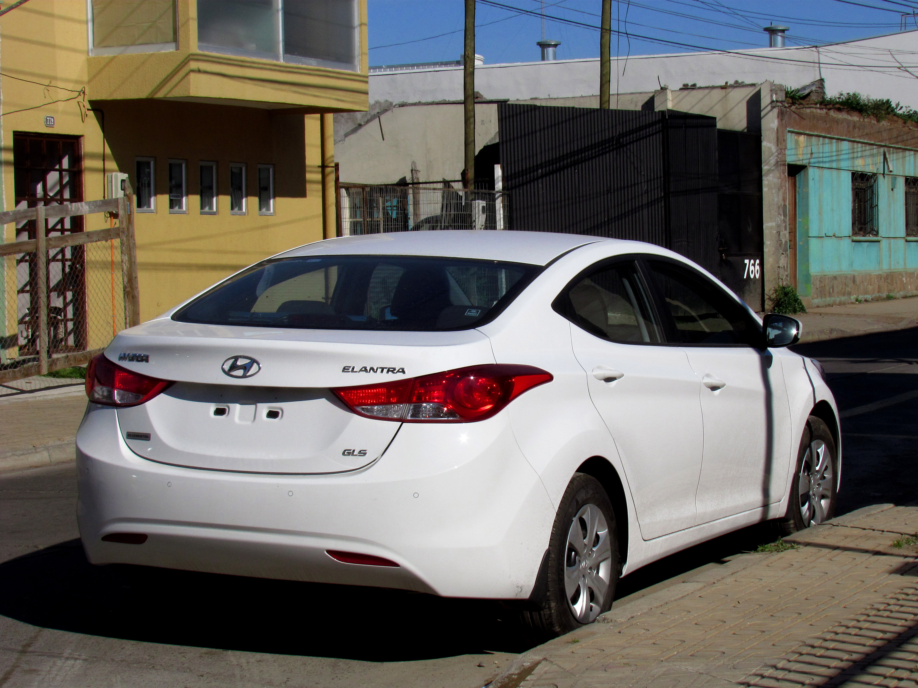 Hyundai Elantra 1.6 GLS 2012